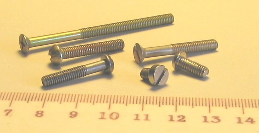 Ŝraŭboj kun ŝraŭbajxo M4, kun diversaj kapoj.